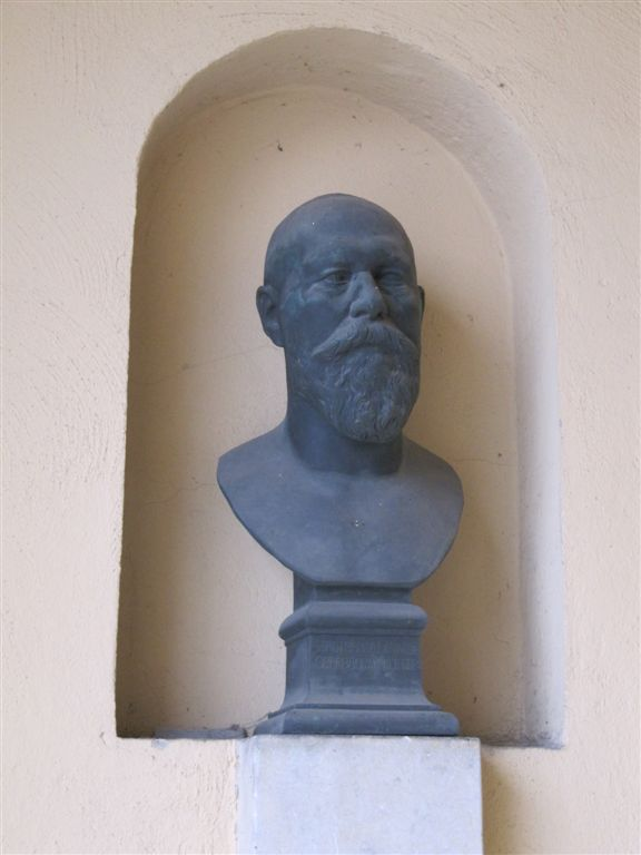 Büste Hermann Klettes am Eingang zum Haus A (Geschäftsführung) der Kläranlage Dresden-Kaditz